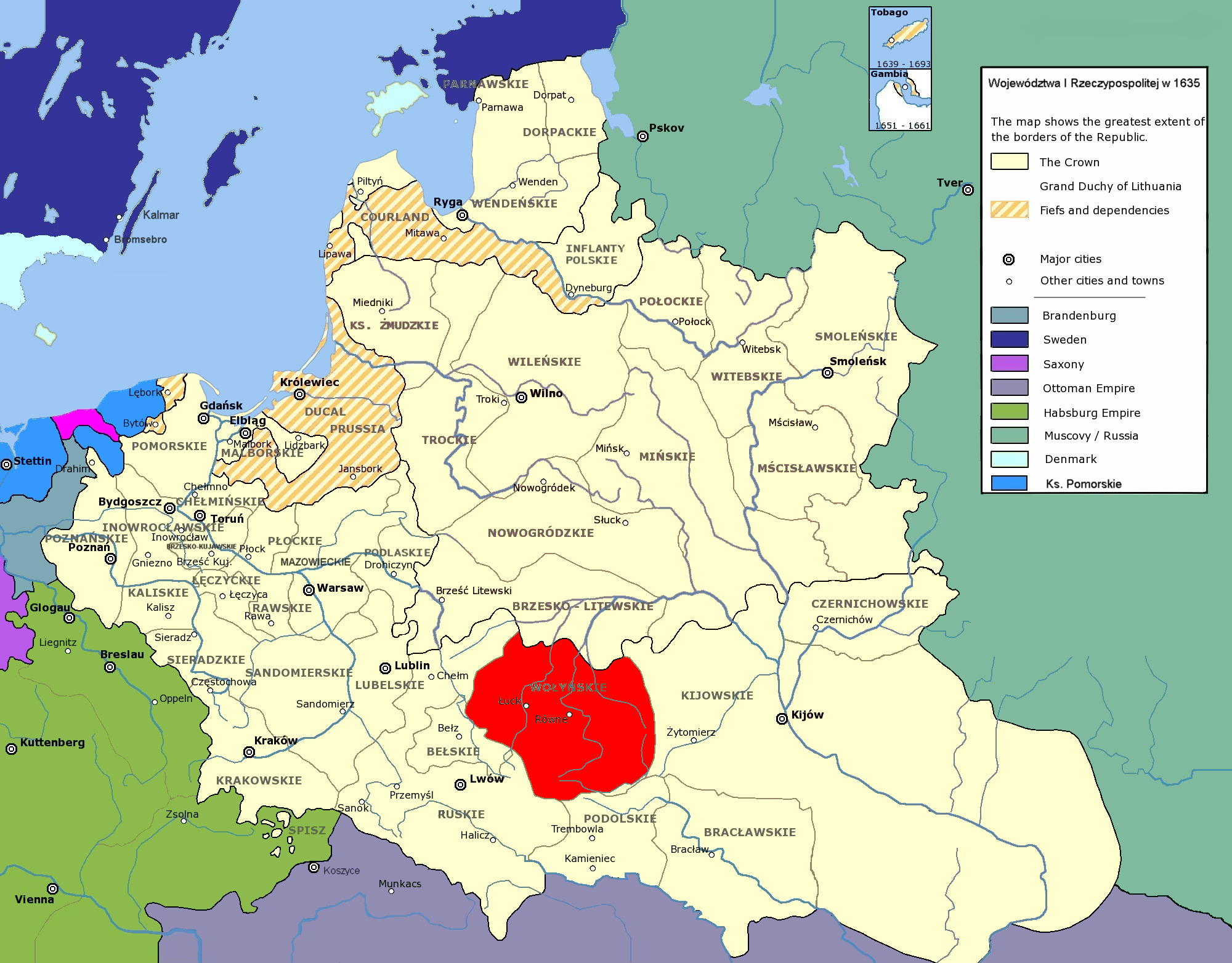 Rzeczpospolita Obojga Narodów w 1635 r.; województwo wołyńskie Polish-Lithuanian Commonwealth in 1635; Wołyń Voivodeship